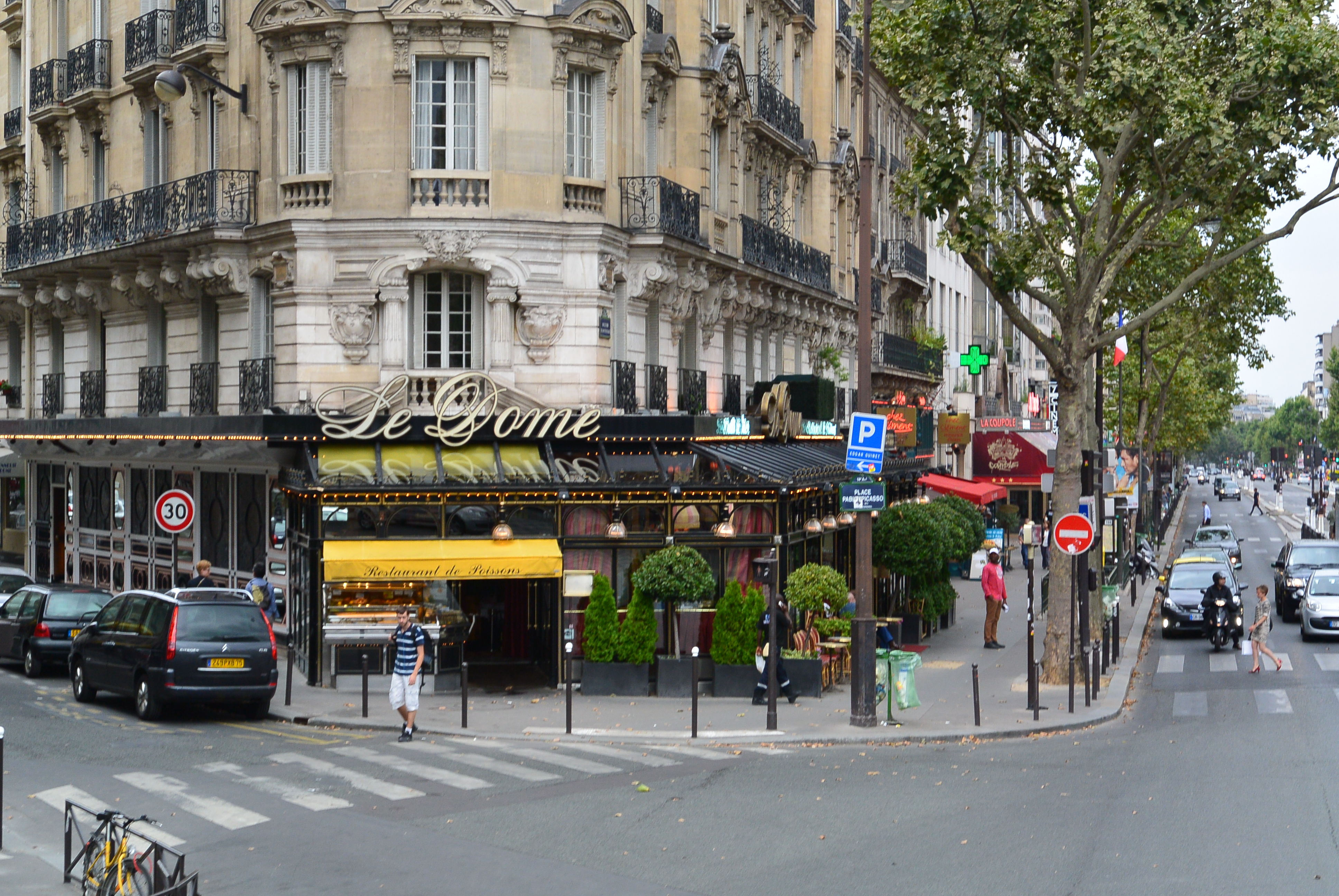 Le Dôme Café, 108 Boulevard du Montparnasse, 75014 Paris, France.